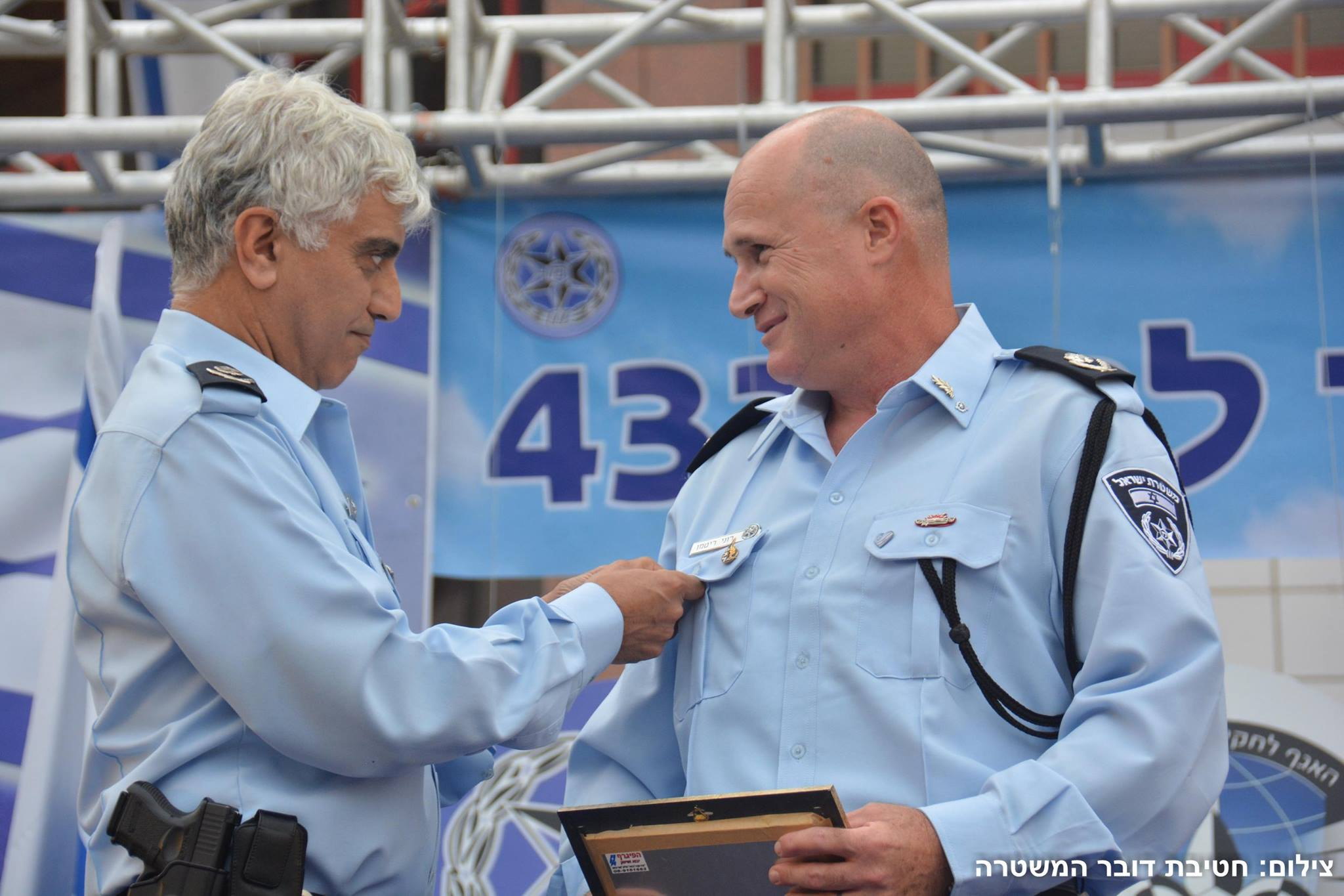 מני יצחקי (משמאל) ורוני ריטמן (מימין)